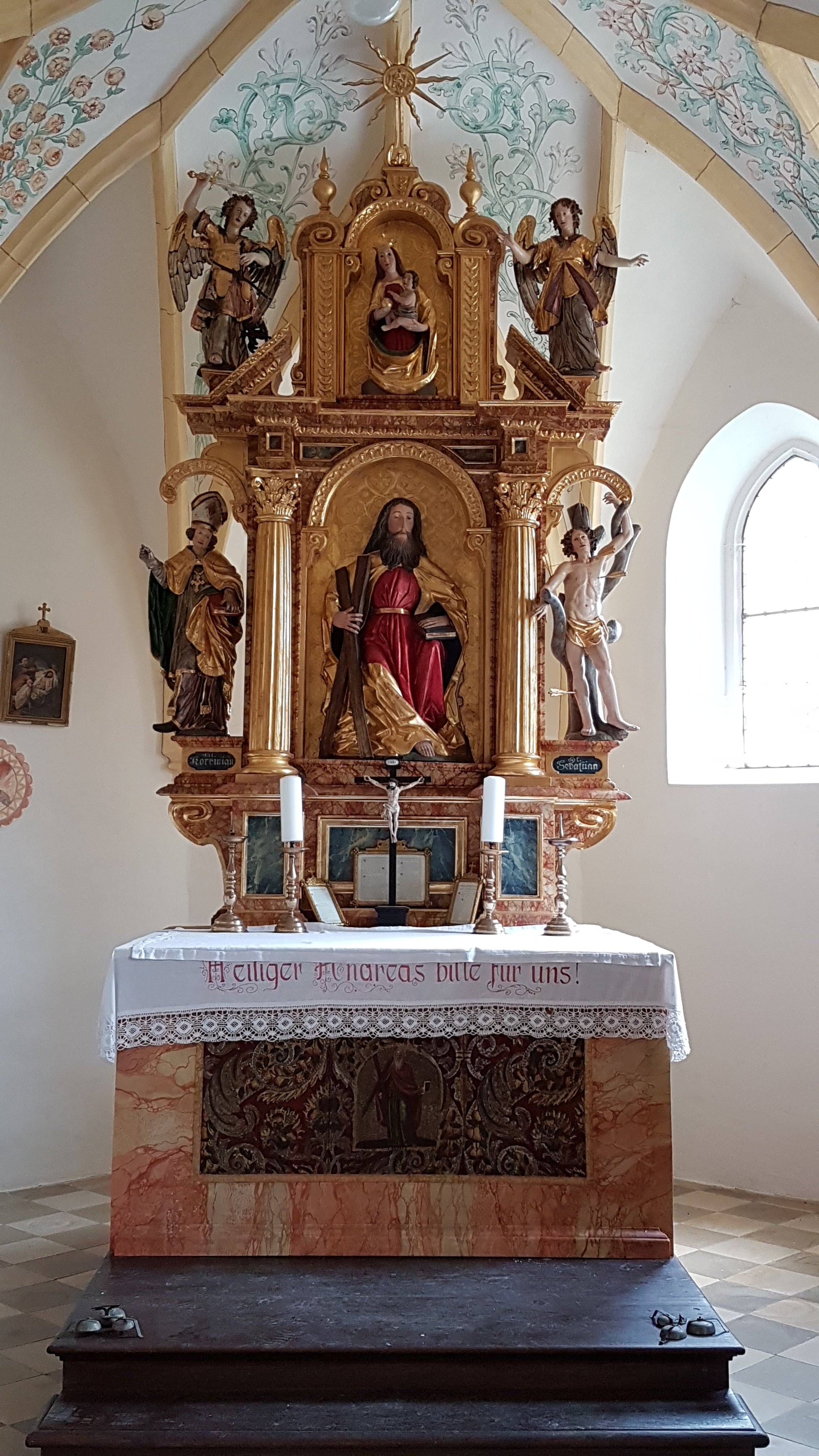 Geilertshausen (Egling), Filialkirche St. Andreas, Frühbarocker Hochaltar (1651) von Georg Mittermayer u. Kaspar Niederreiter.